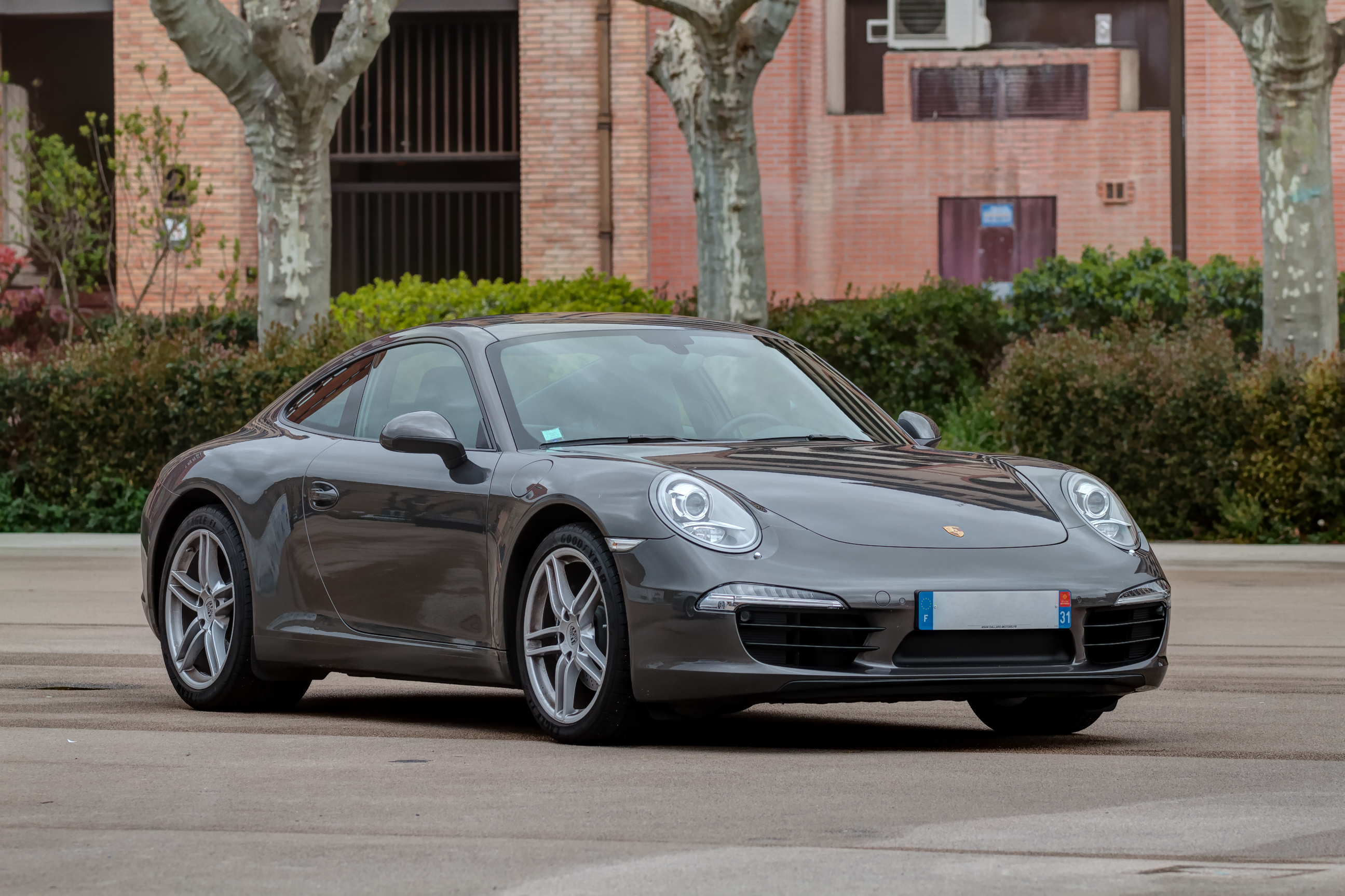 Porsche 911 Carrera (2011) à la Toulousaine de l'automibile.